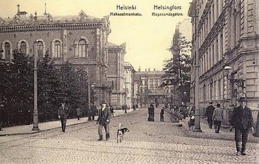 Nykyinen keskuskatu